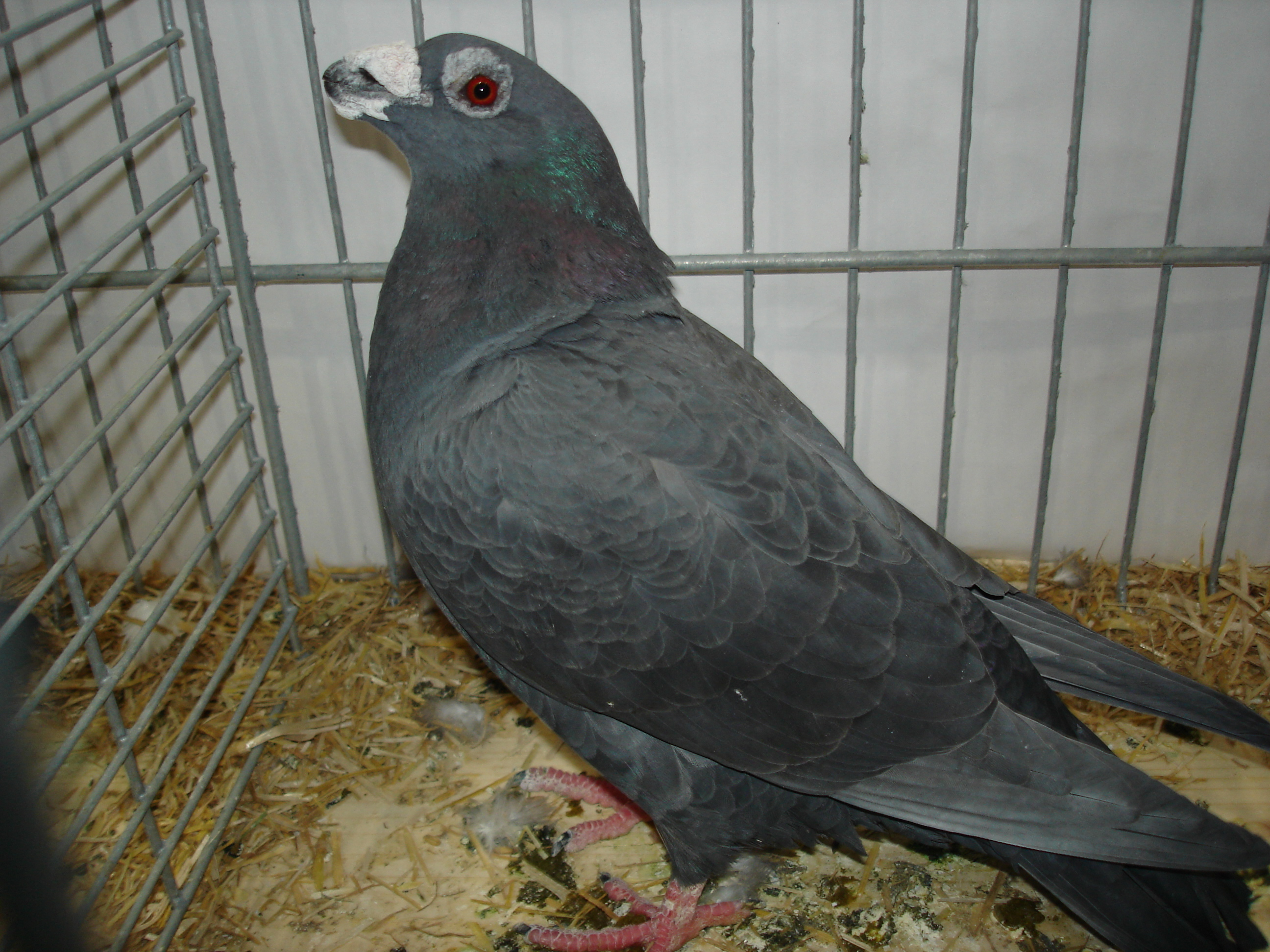 Zdjęcie gołębia zwanego dragonem (2)